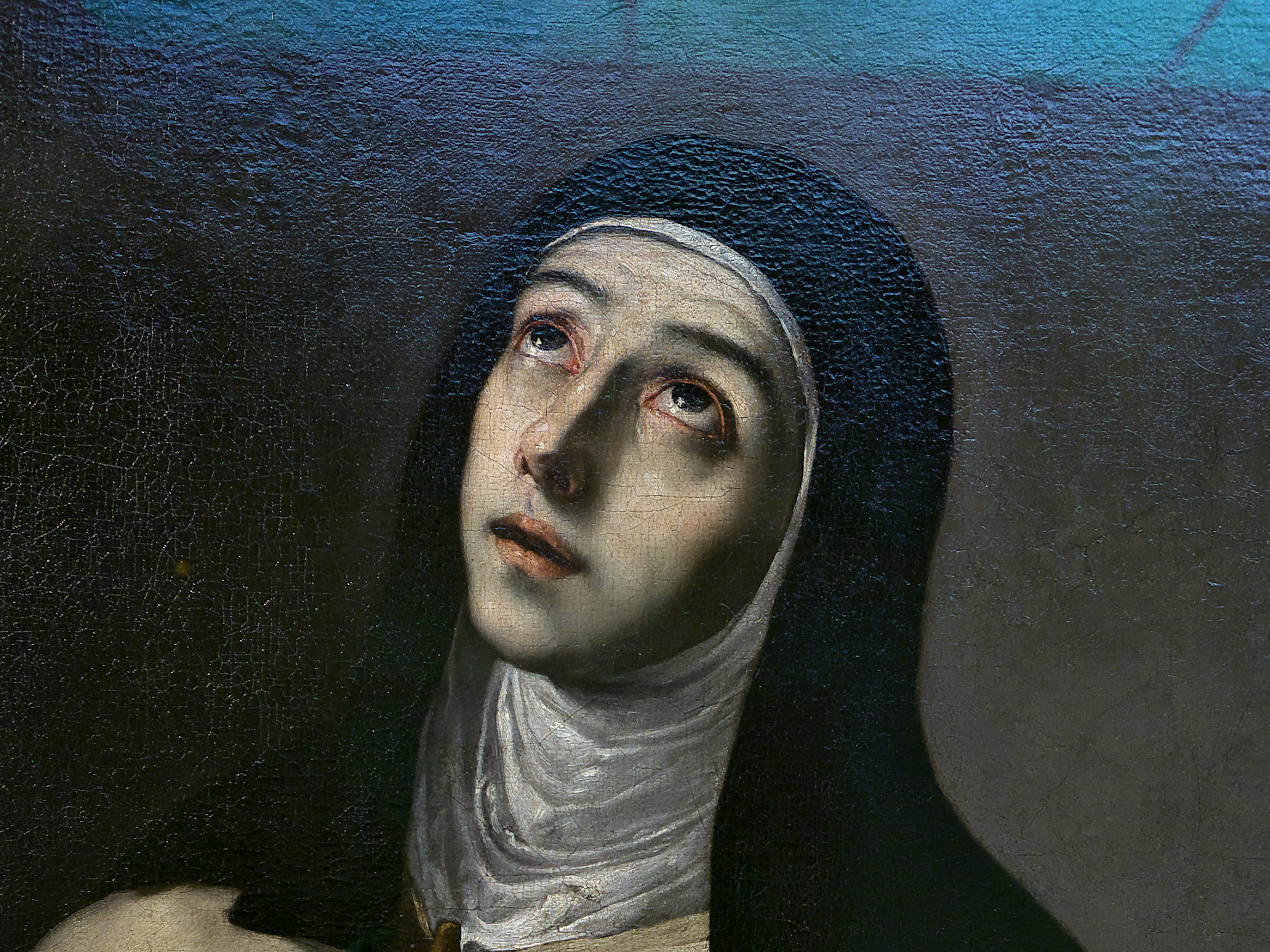 Museo de Bellas Artes de Sevilla. Pormenor, José de Ribera (1630)